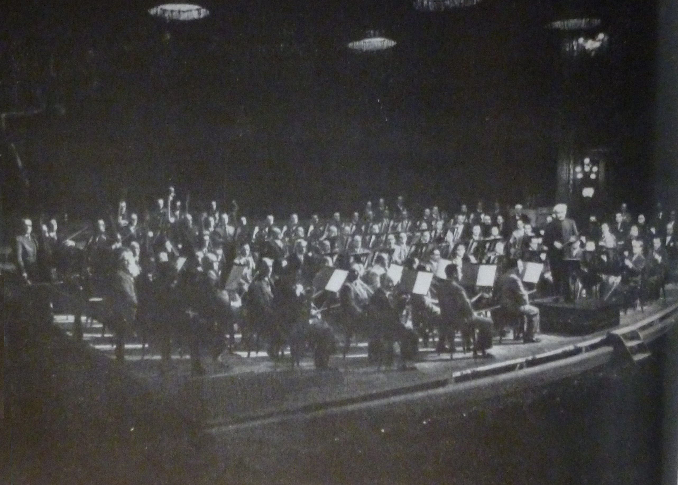 Arturo Toscanini, dirigiendo en el Teatro Colón de Buenos Aires, 1941.